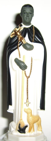 St. Martín de Porres